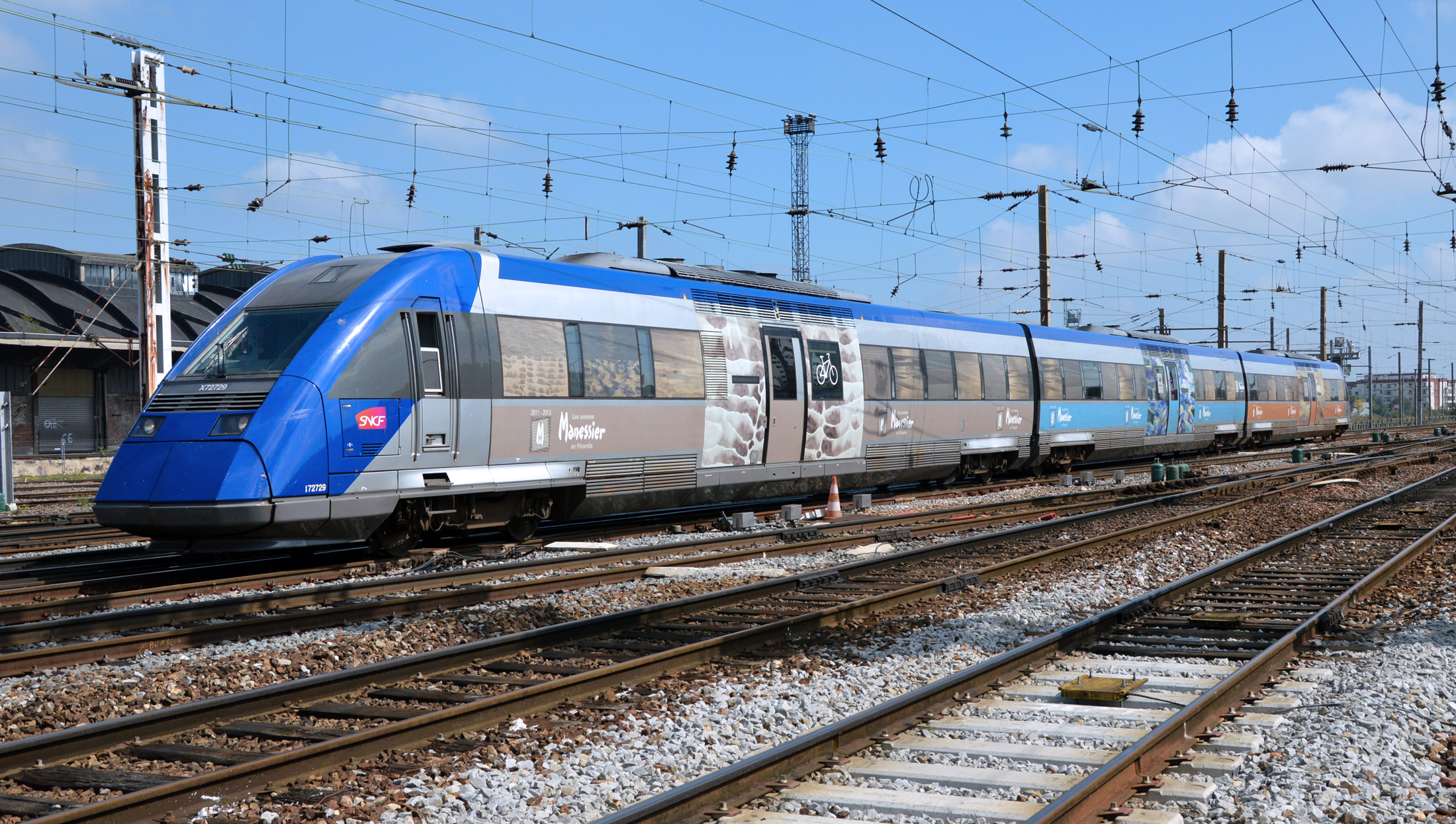 X 72729/30 avec pelliculage spécial 2011-2013 "Les années Manessier en Picardie" en sortie de la gare d'Amiens (80)